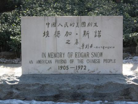 Photo taken on vacation in Beijing.